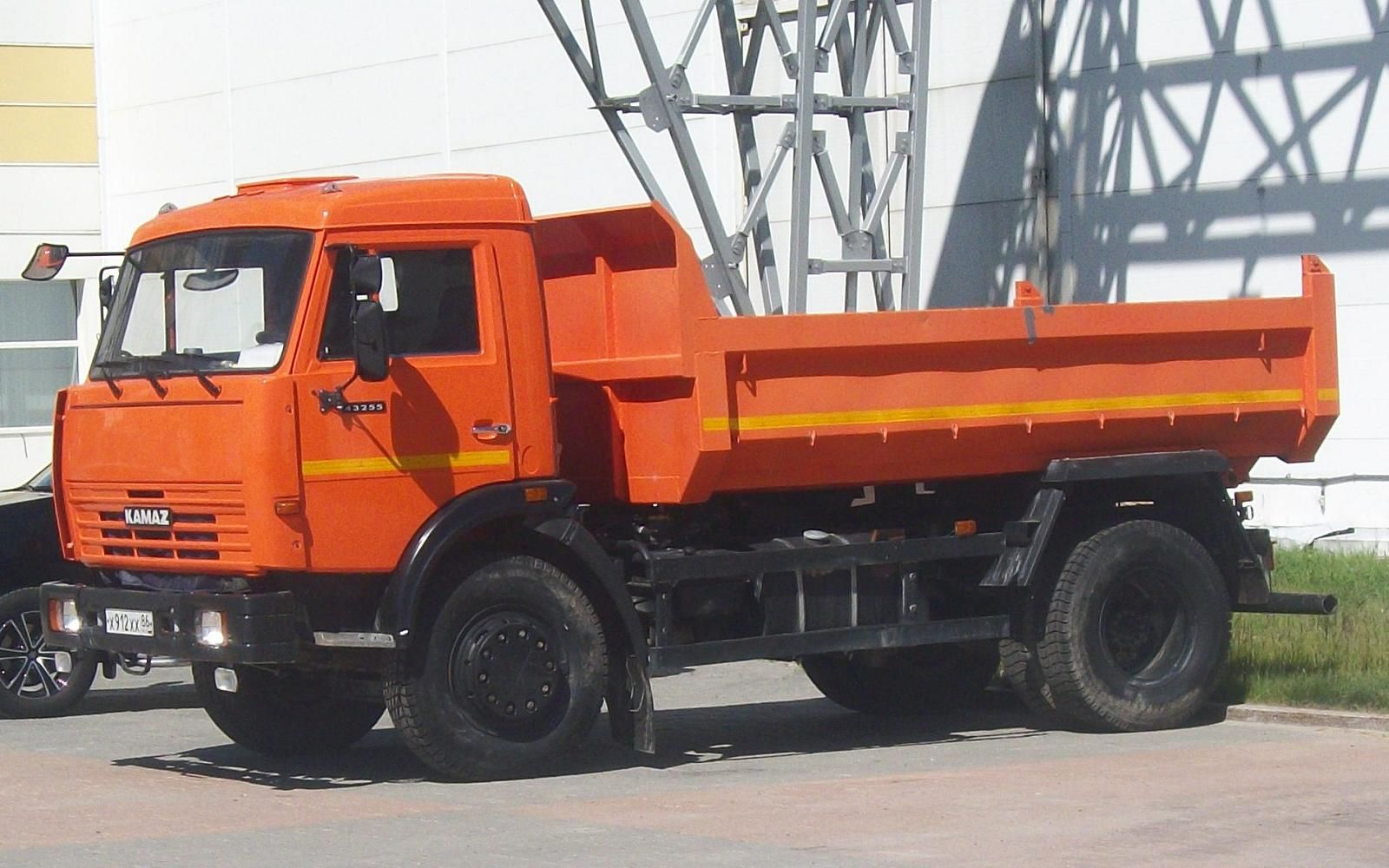 Камаз-43255, Ханты-Мансийск